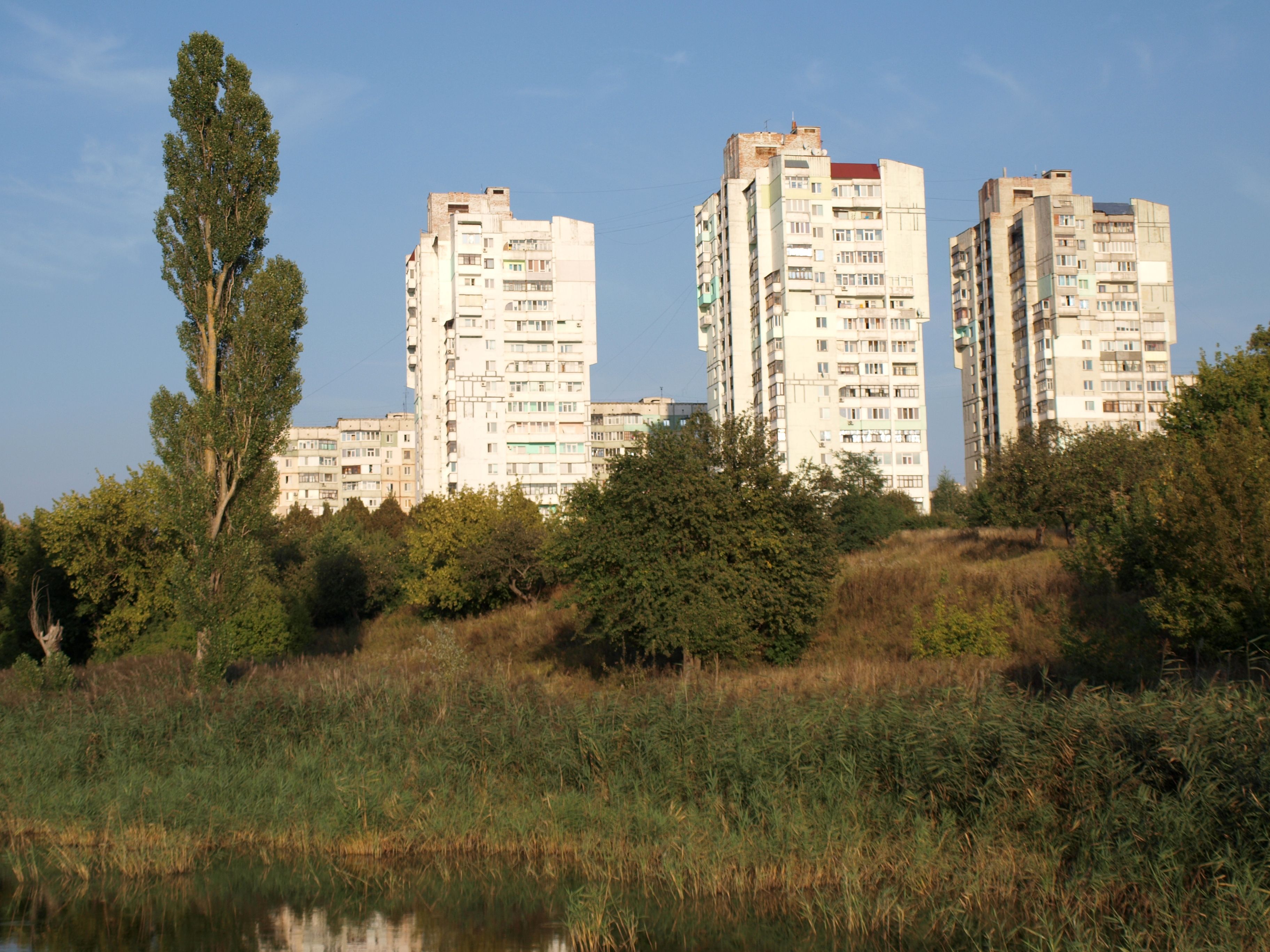 Район Огнівка в Полтаві (вид з північного заходу)